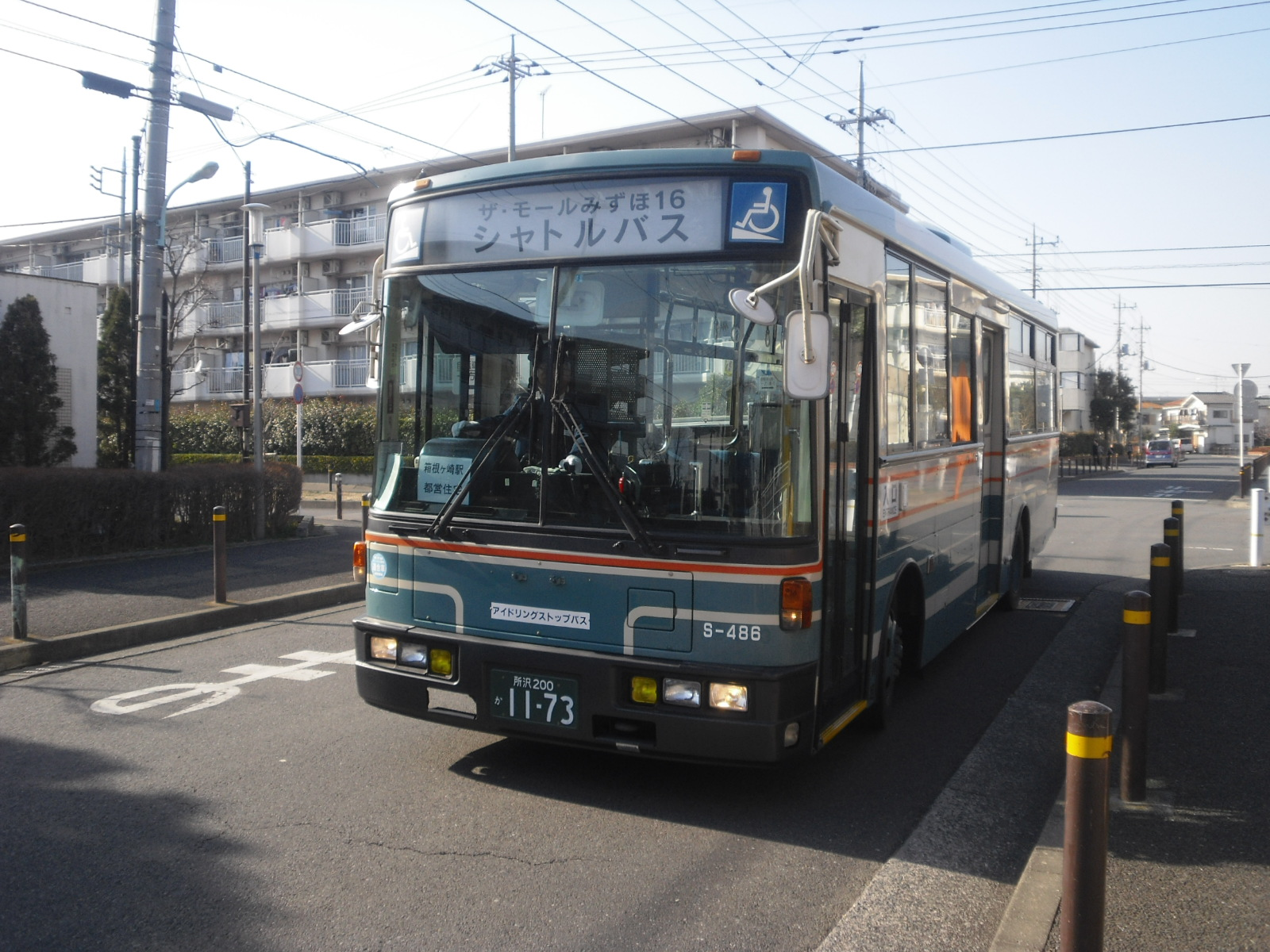 西武総合企画飯能営業所所属 S486(元A2-833) 瑞穂都営住宅で撮影